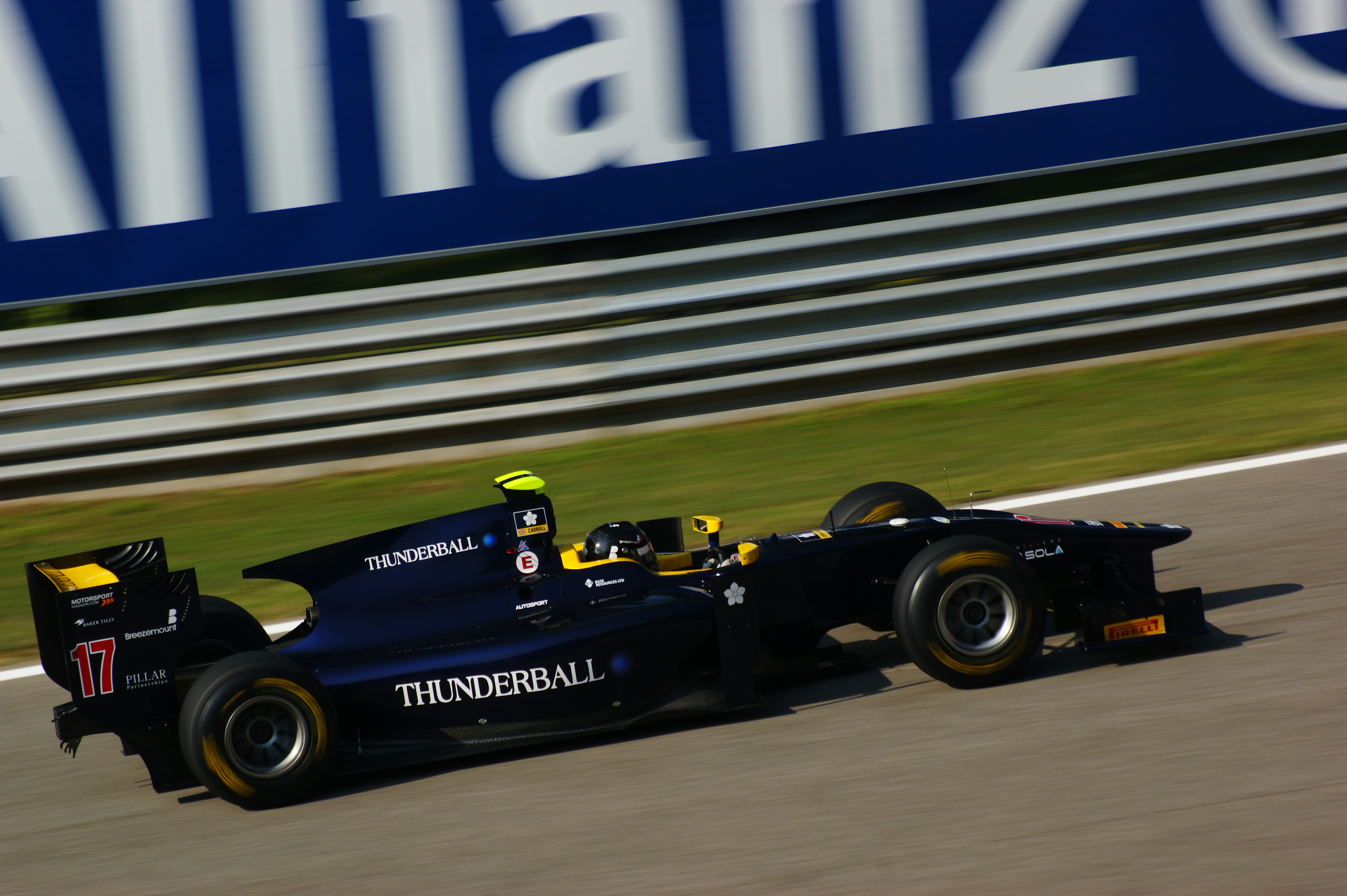 Adam Carroll alla variante della roggia Monza 2011